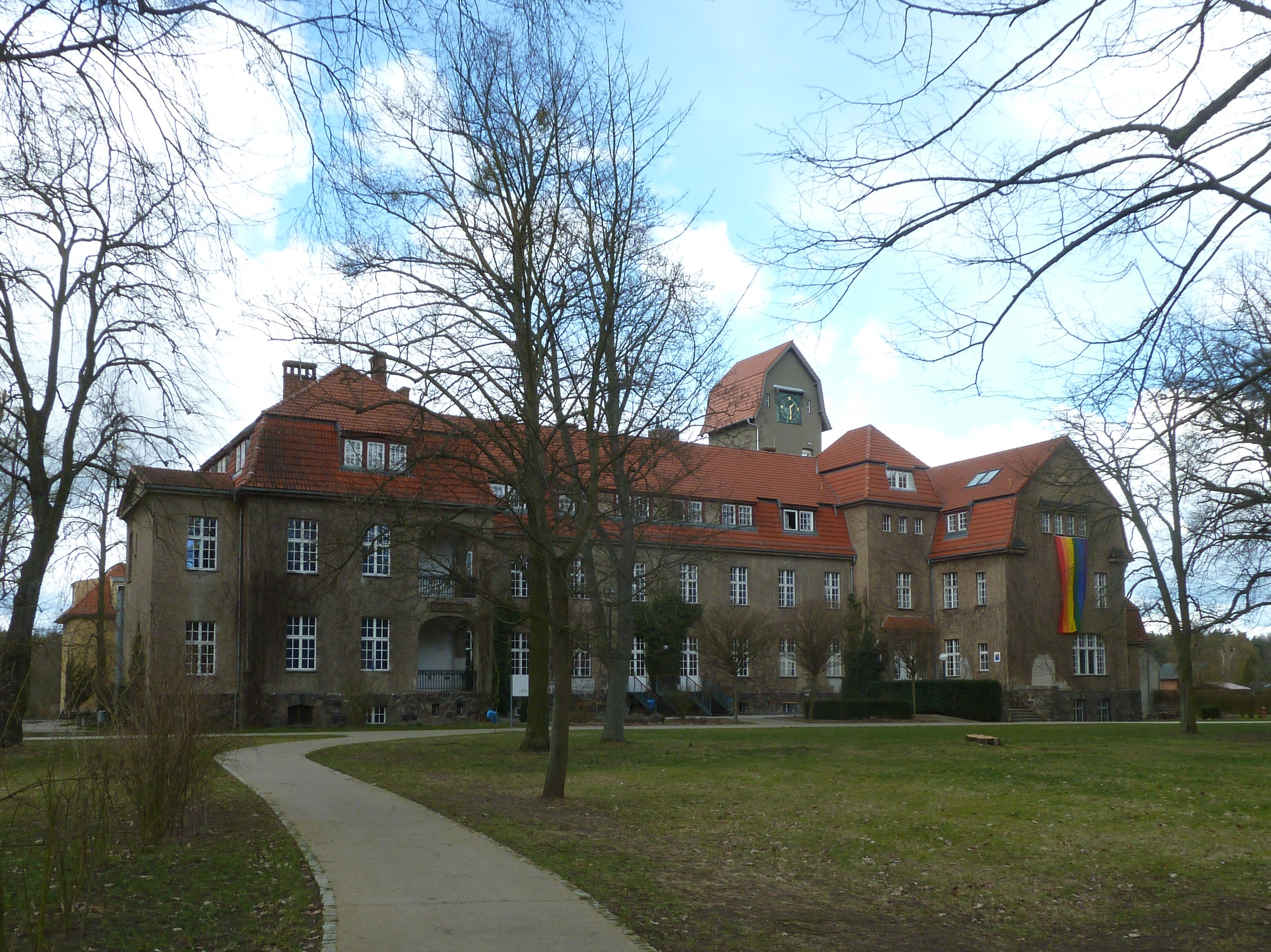 Werfpfuhl, Stadt Werneuchen, denkmalgeschütztes ehemaliges Johannaheim